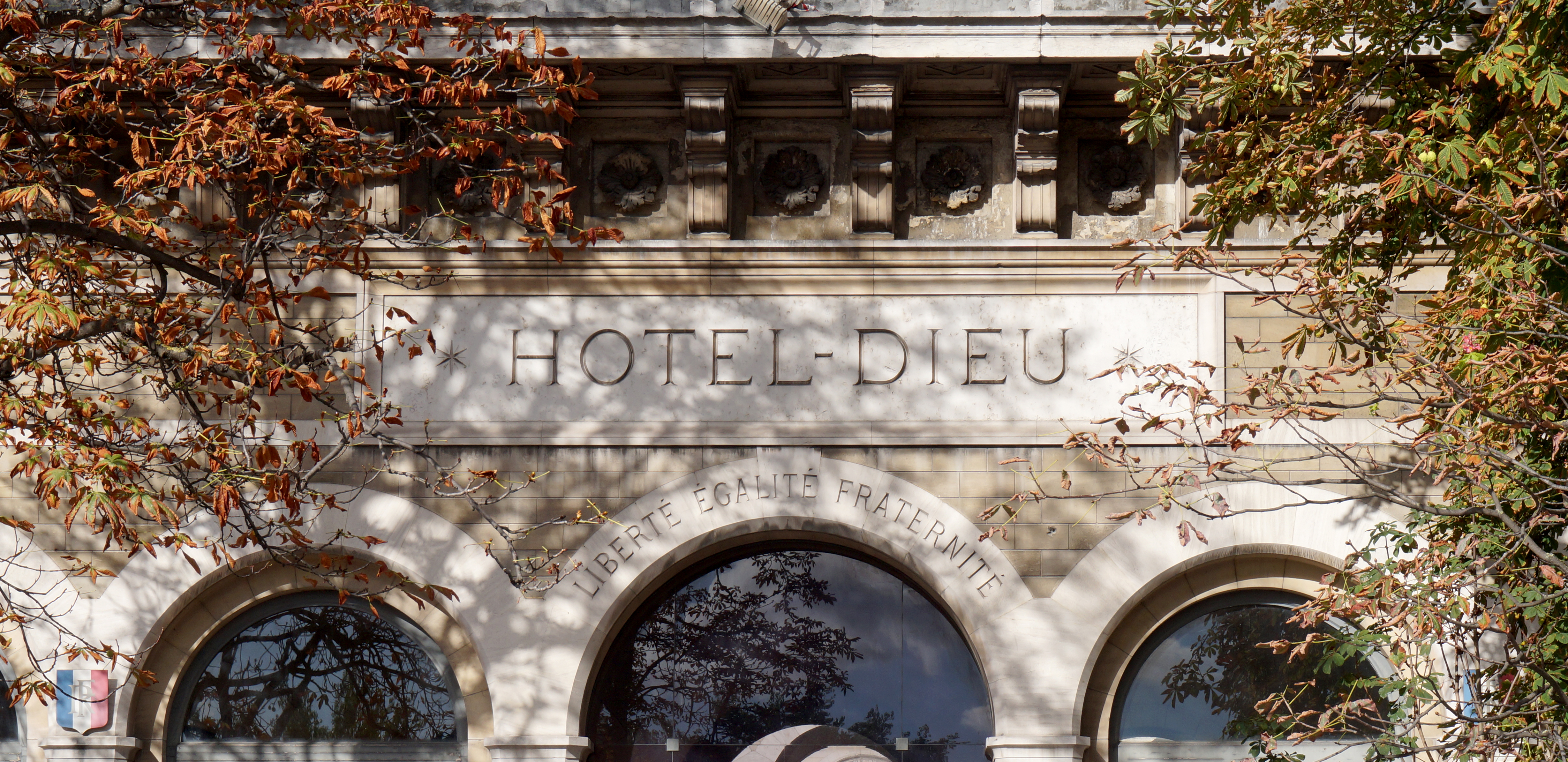 Vu depuis le parvis de Notre-Dame